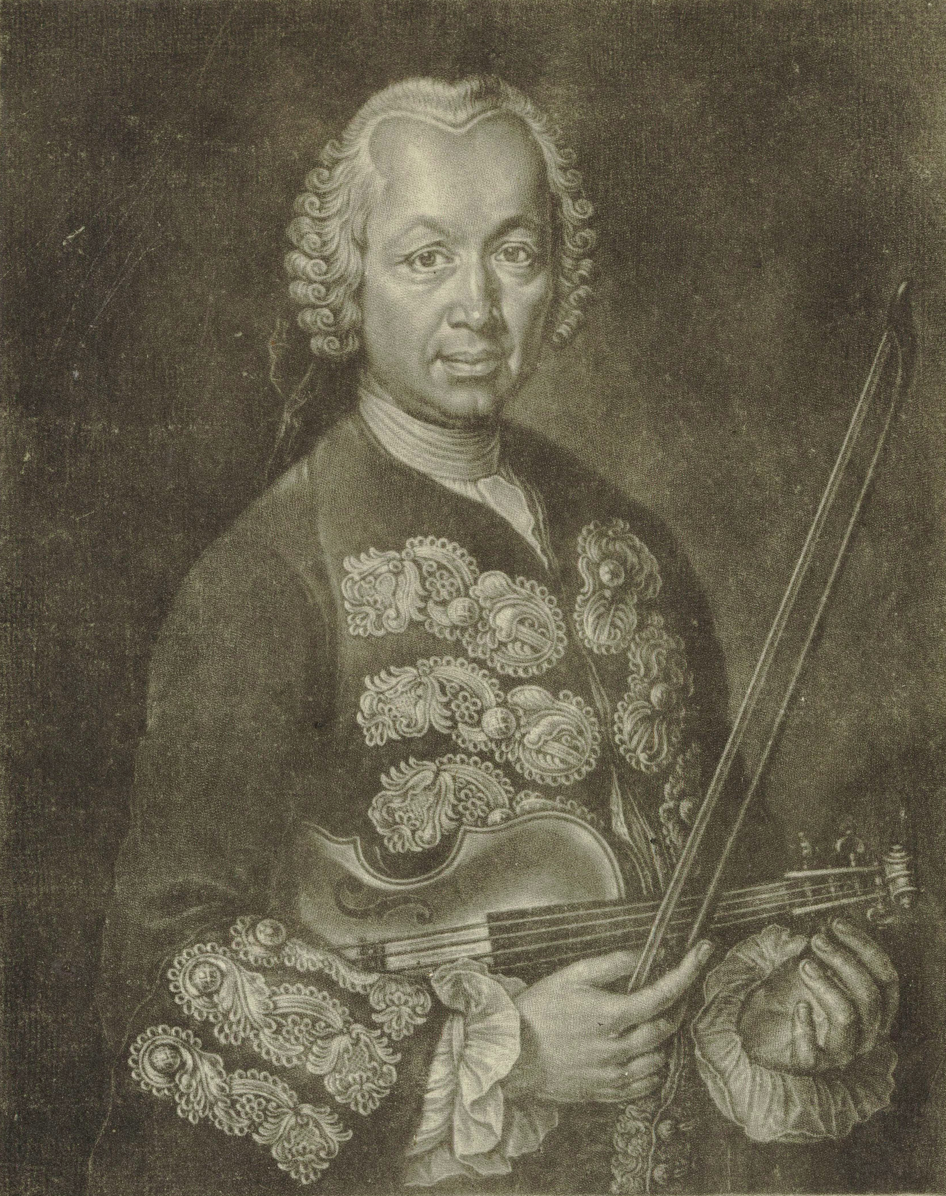 Depicted person: František Benda